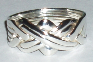 Description